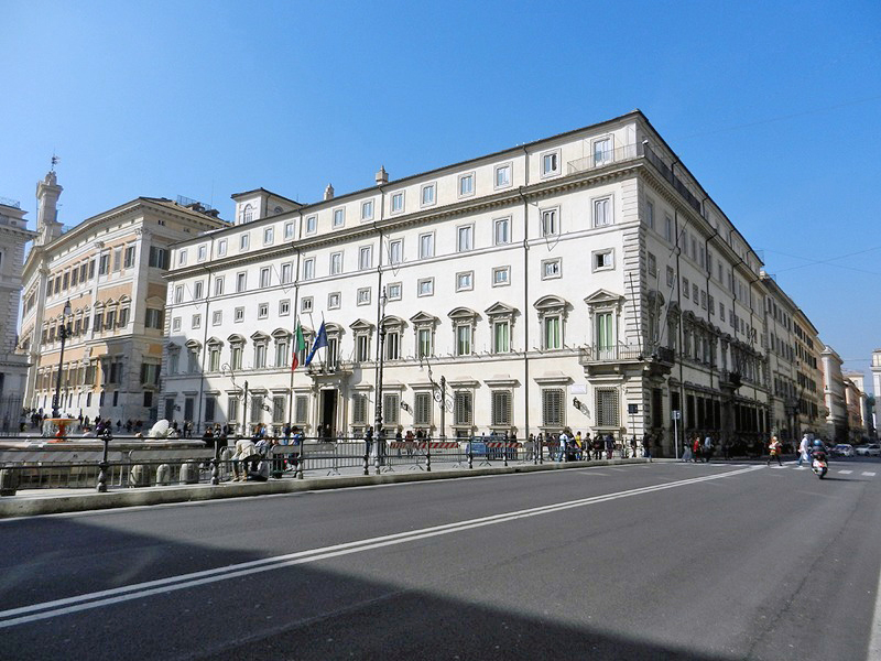 Roma - Palazzo Chigi